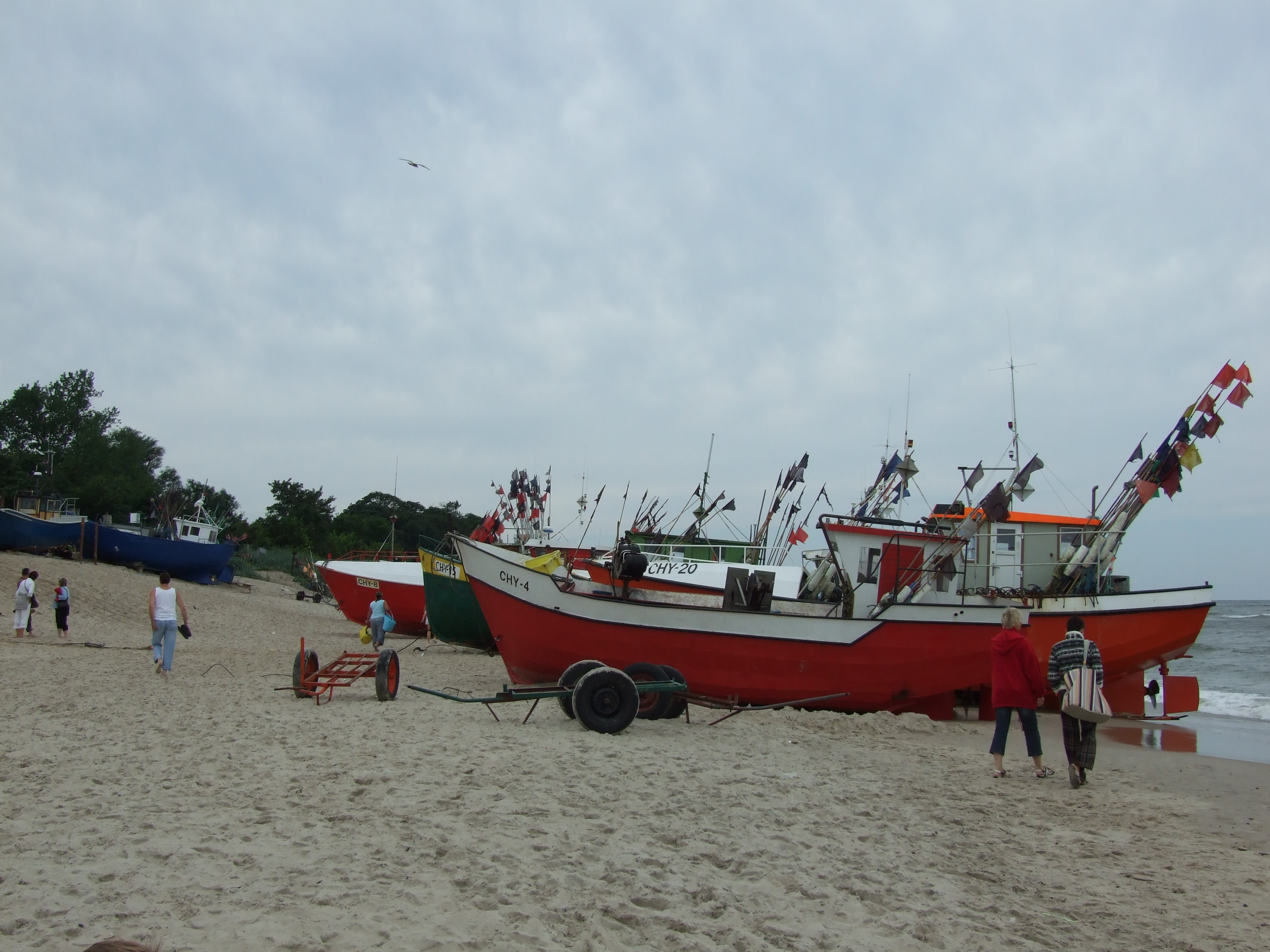 Port rybacki w Chłopach